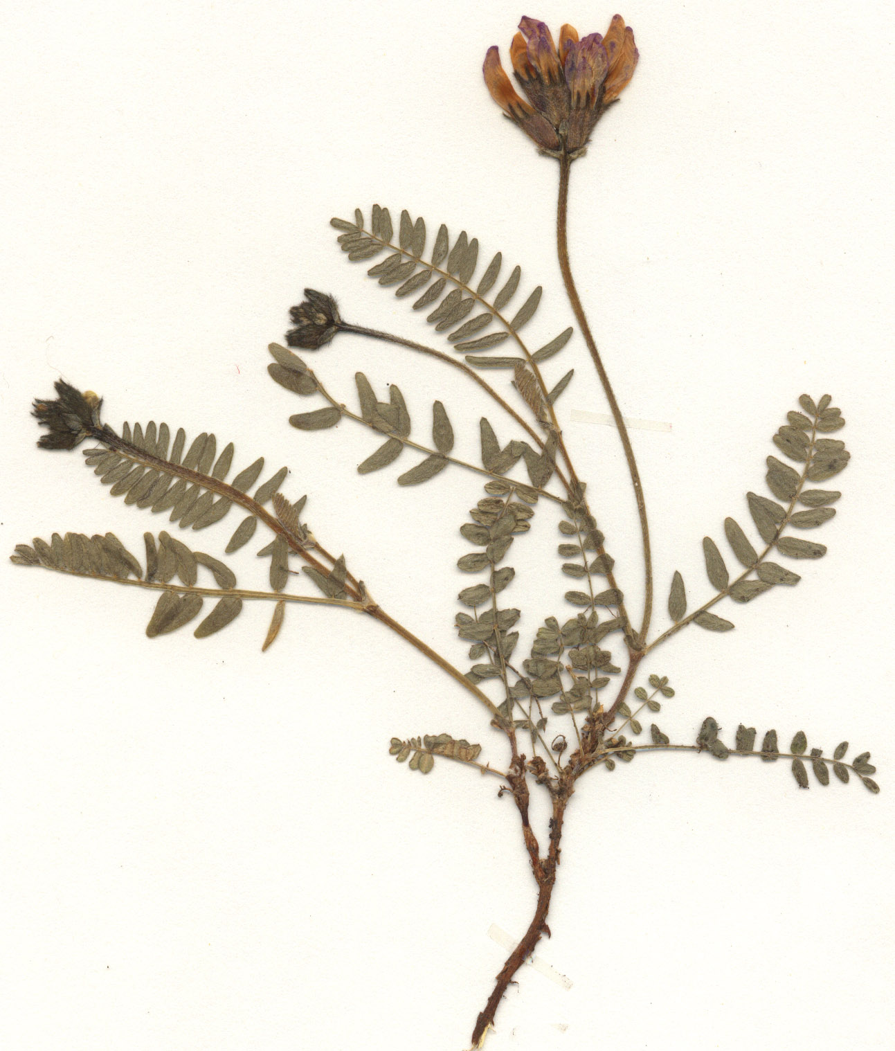 eigener Herbarbeleg